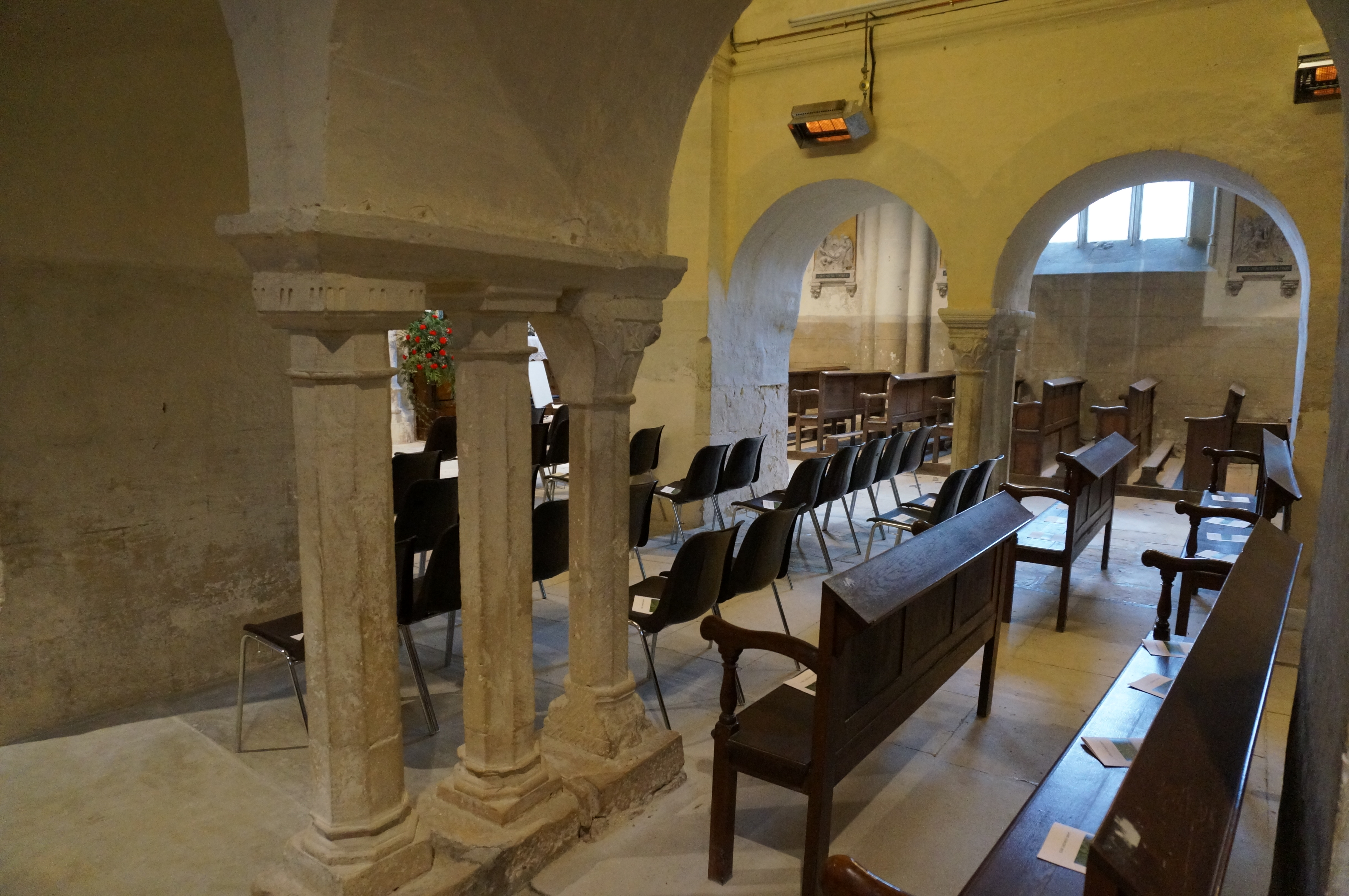 à Trigny.